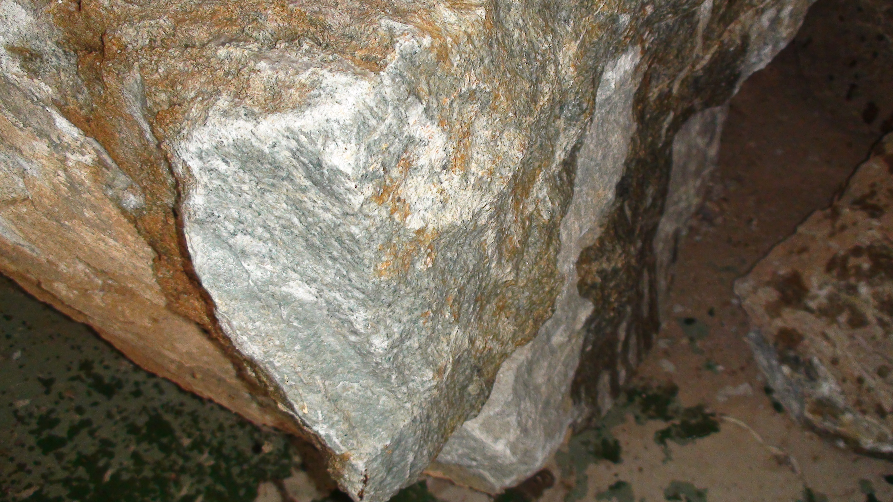 쿼츠다이옵사이드, 2011년 4월